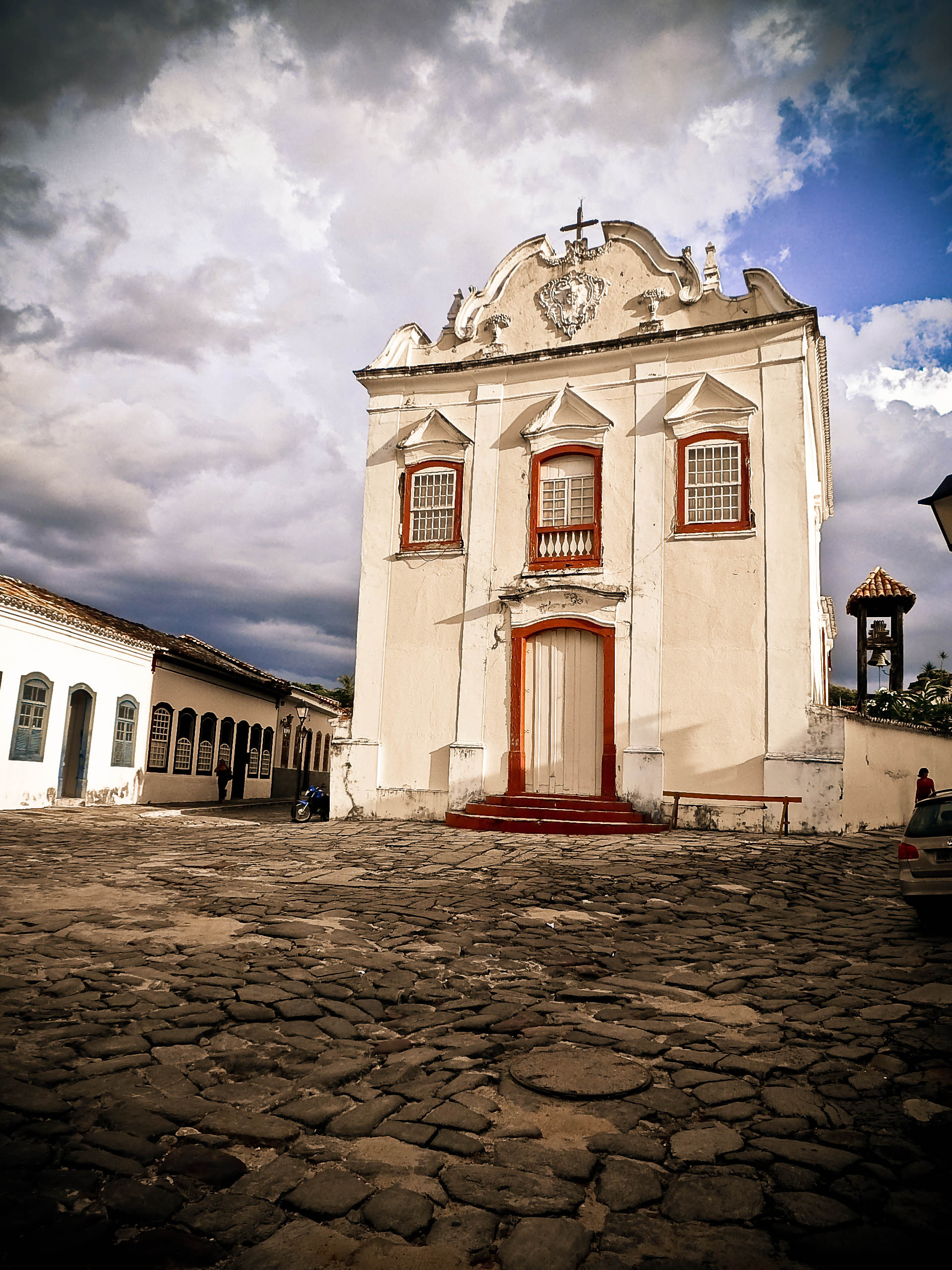 Igreja Nossa Senhora da Boa Morte e Museu de Arte Sacra da Boa Morte, localizado em Goiás (GO).